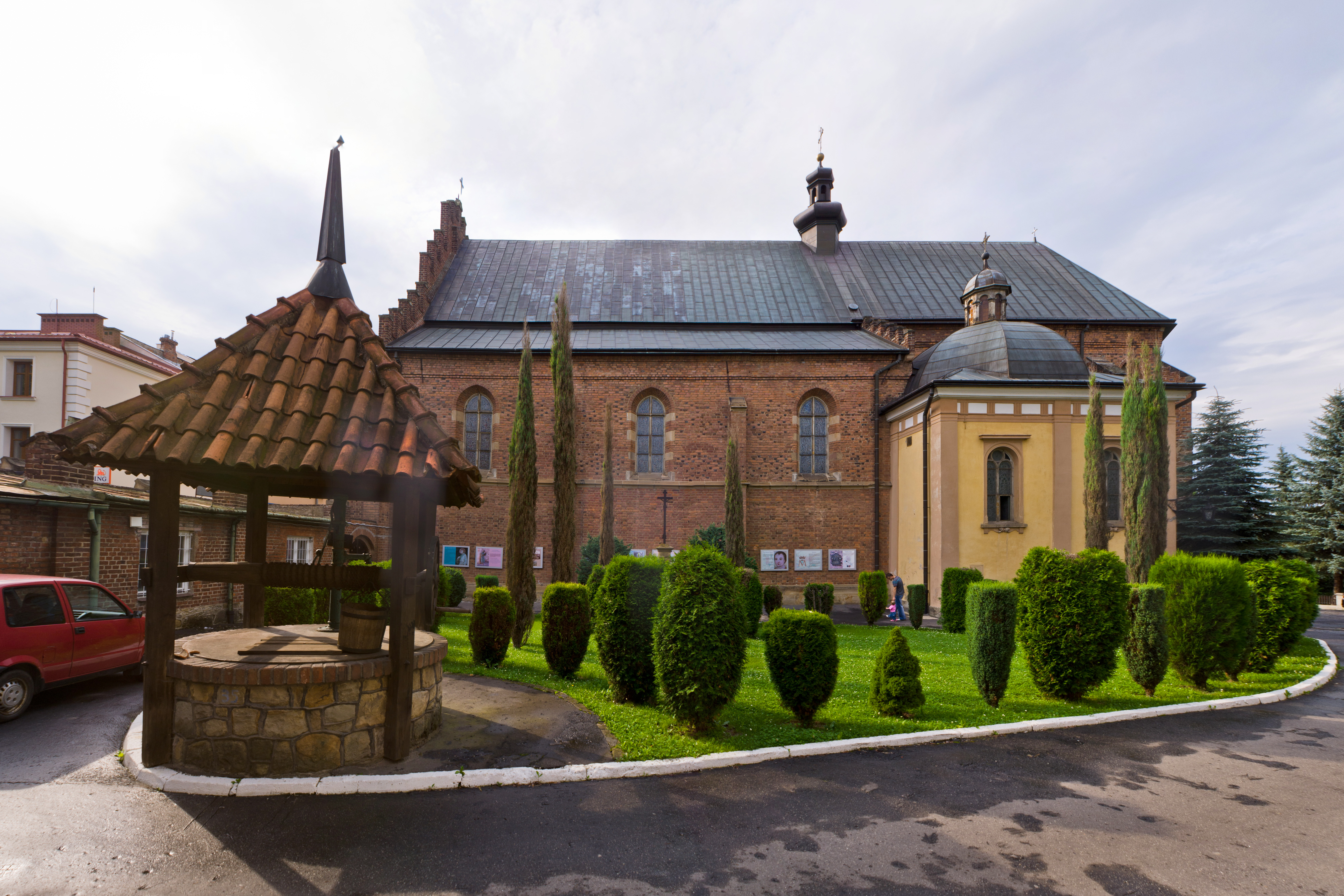 Kościół oo. Franciszkanów w Krośnie.